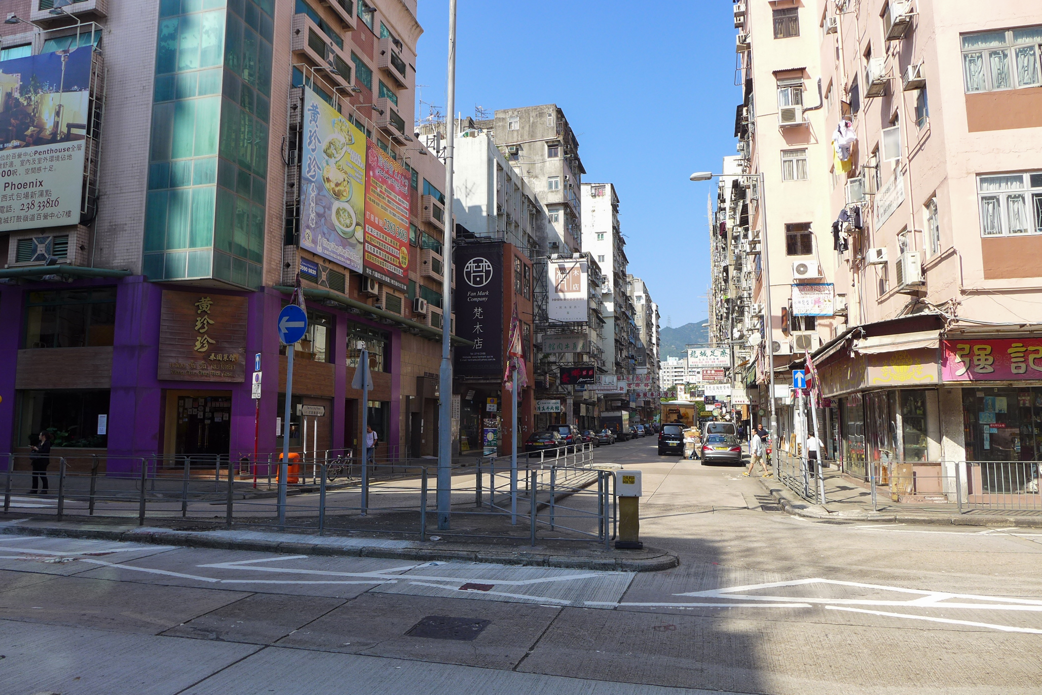 Tak Ku Ling Road